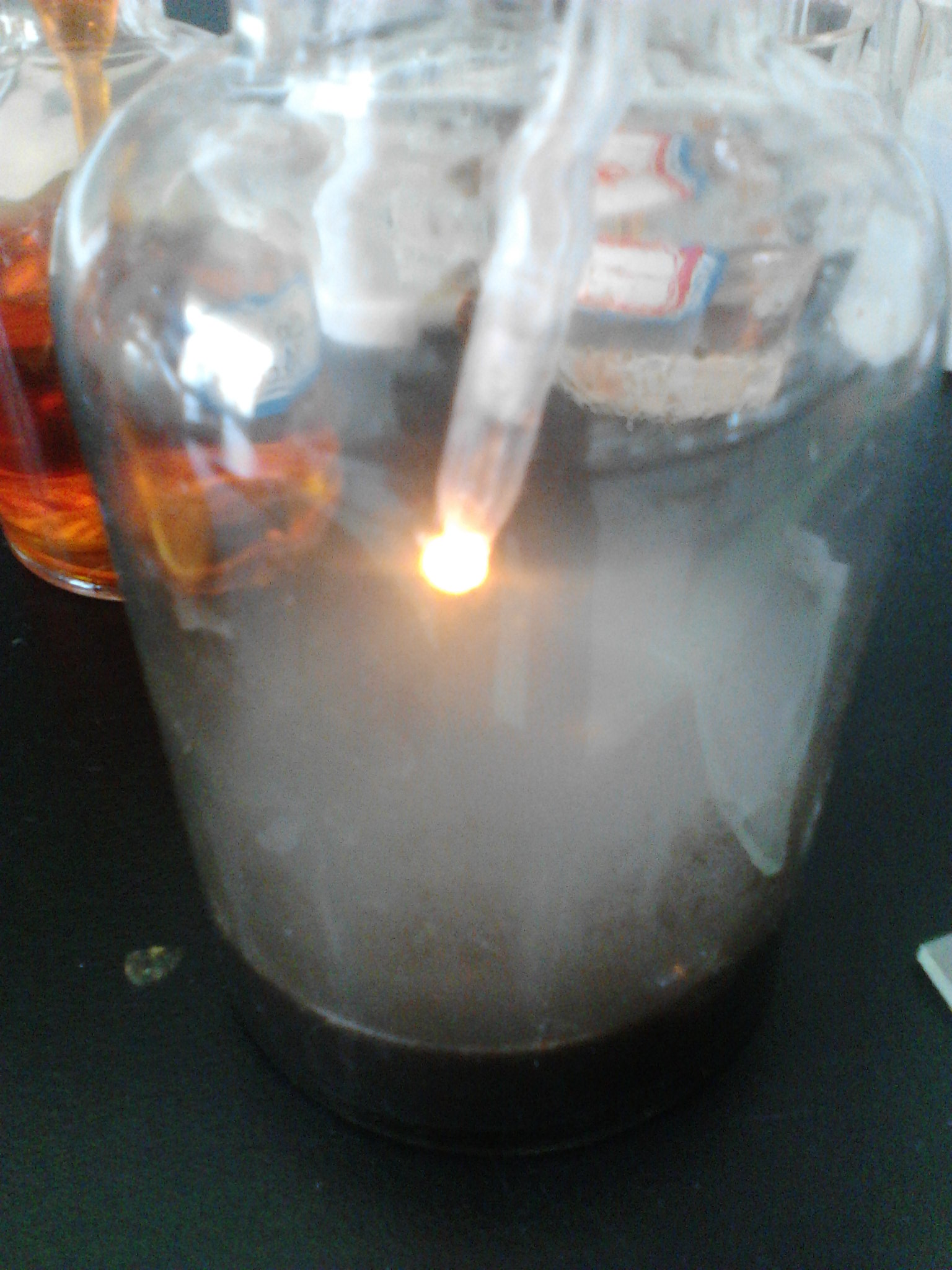 锑化氢在纯氧中燃烧，发出明亮的橙色火焰并放出热。（注：SbH3产生速率较慢）